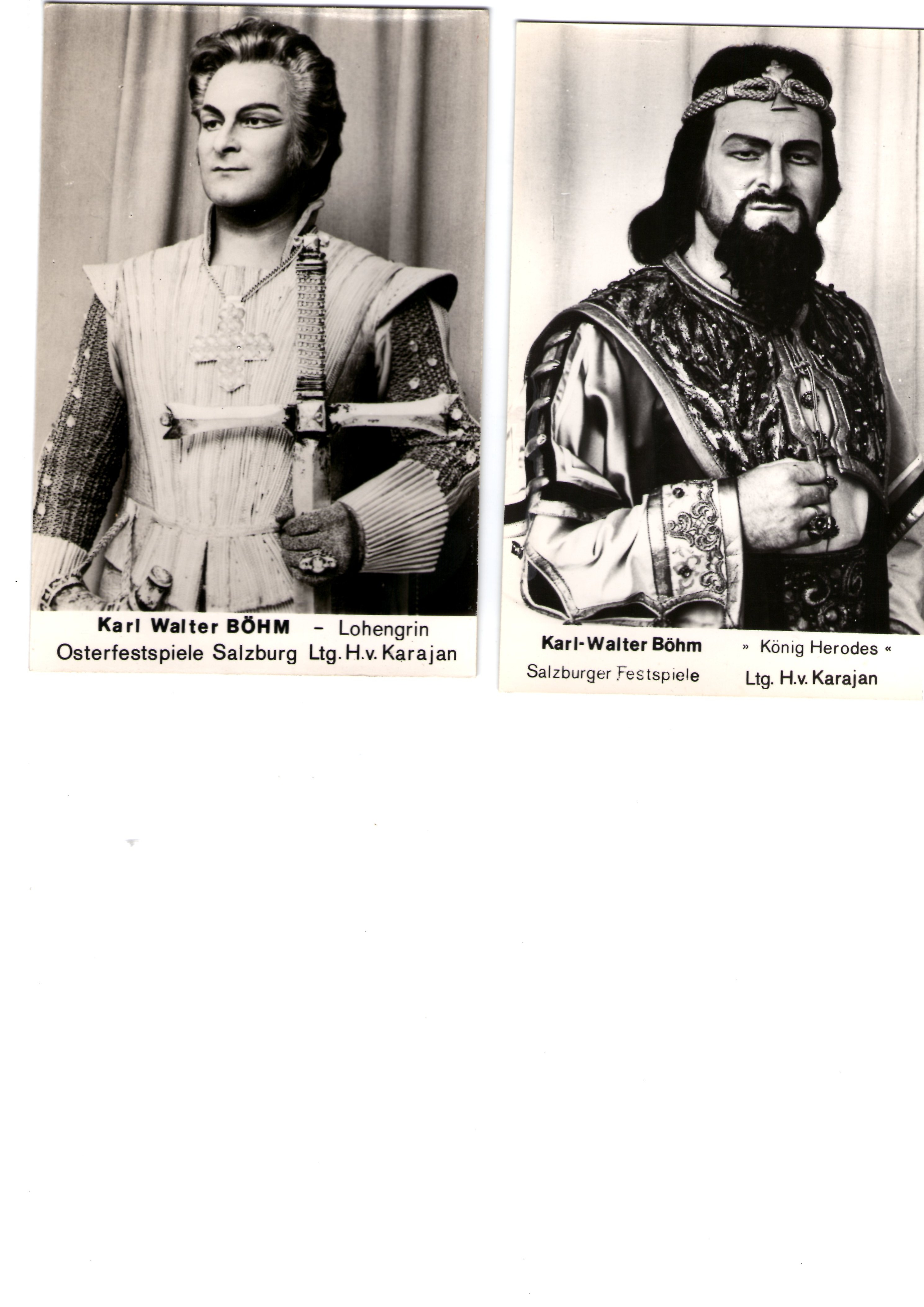 aus dem Nachlass erhaltene Fotos